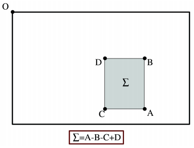 Integrální obraz a způsob výpočtu hodnoty obsahu obdélníkové plochy danou body A, B, C a D. Nulou v levém horním rohu je naznačen počátek.